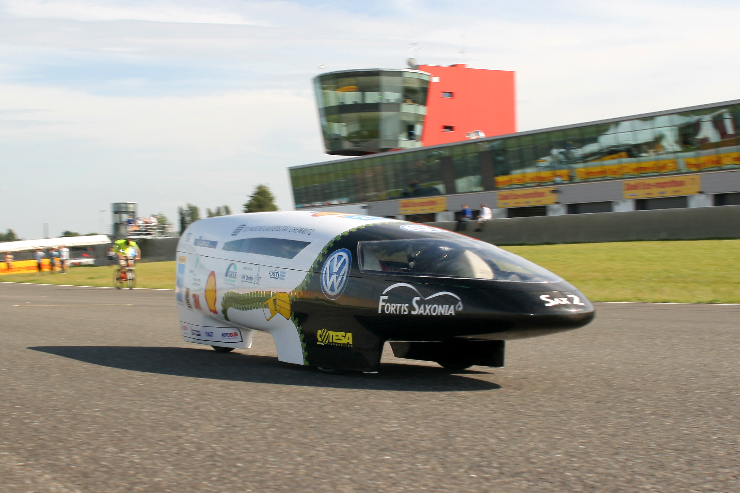 Sax 2 at Circuit Paul Armagnac